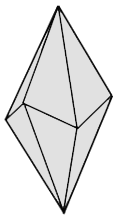 Skalenoeder.